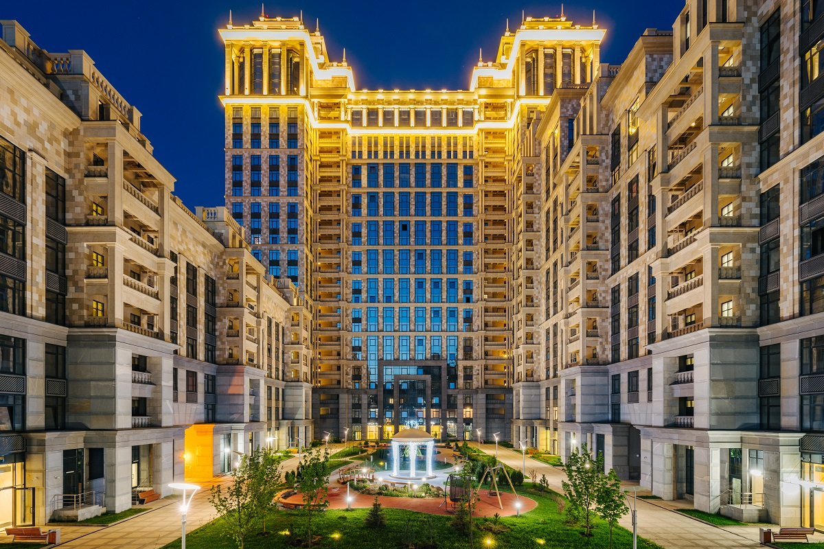 Жилой комплекс "Суббота", Москва, Россия